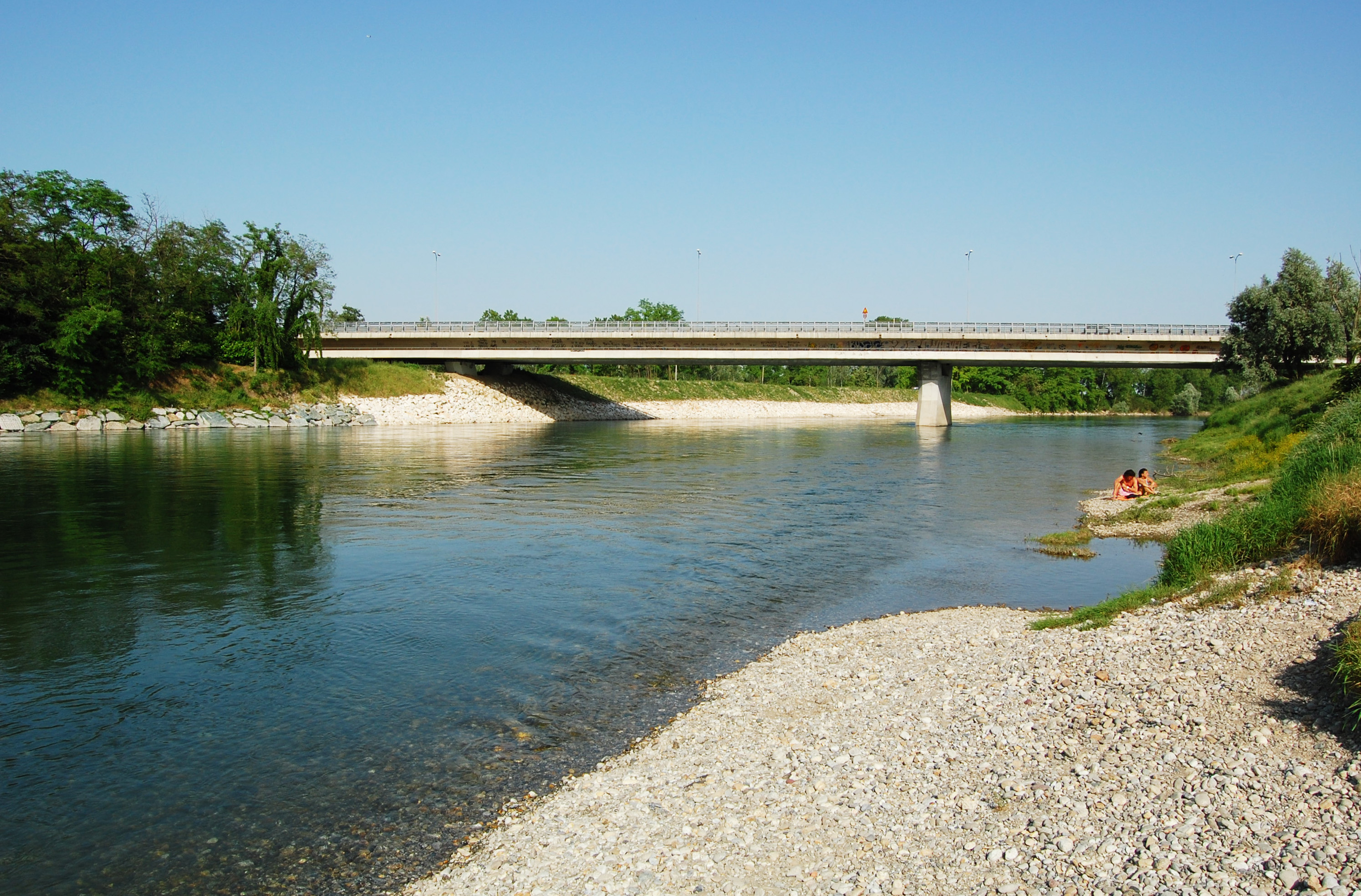 Il nuovo ponte di Lodi sulla Tangenziale Est